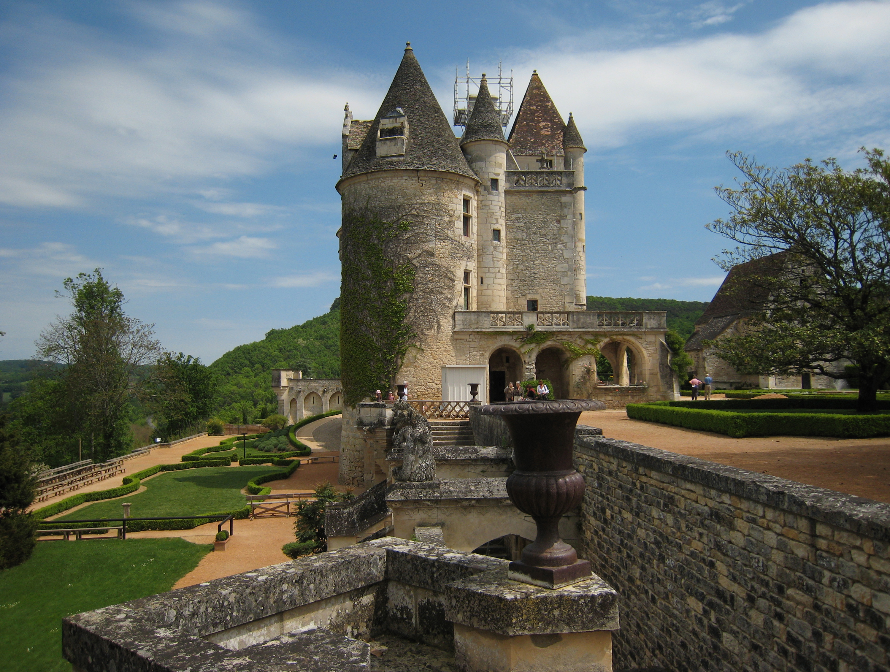 Château Les Milandes in the Département of Dordogne/France Object location44° 49′ 25″ N, 1° 06′ 48″ E